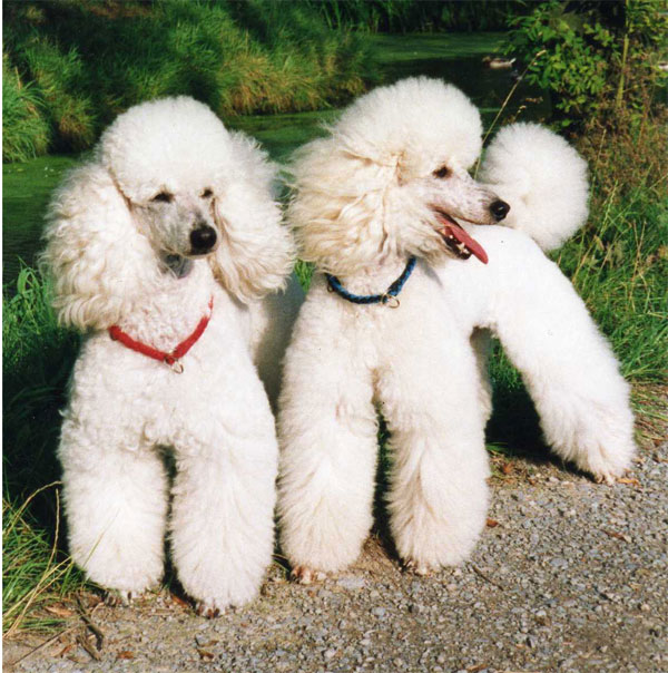 Kleinpudel weiss, Vinny und Wesley vom Elfenberg